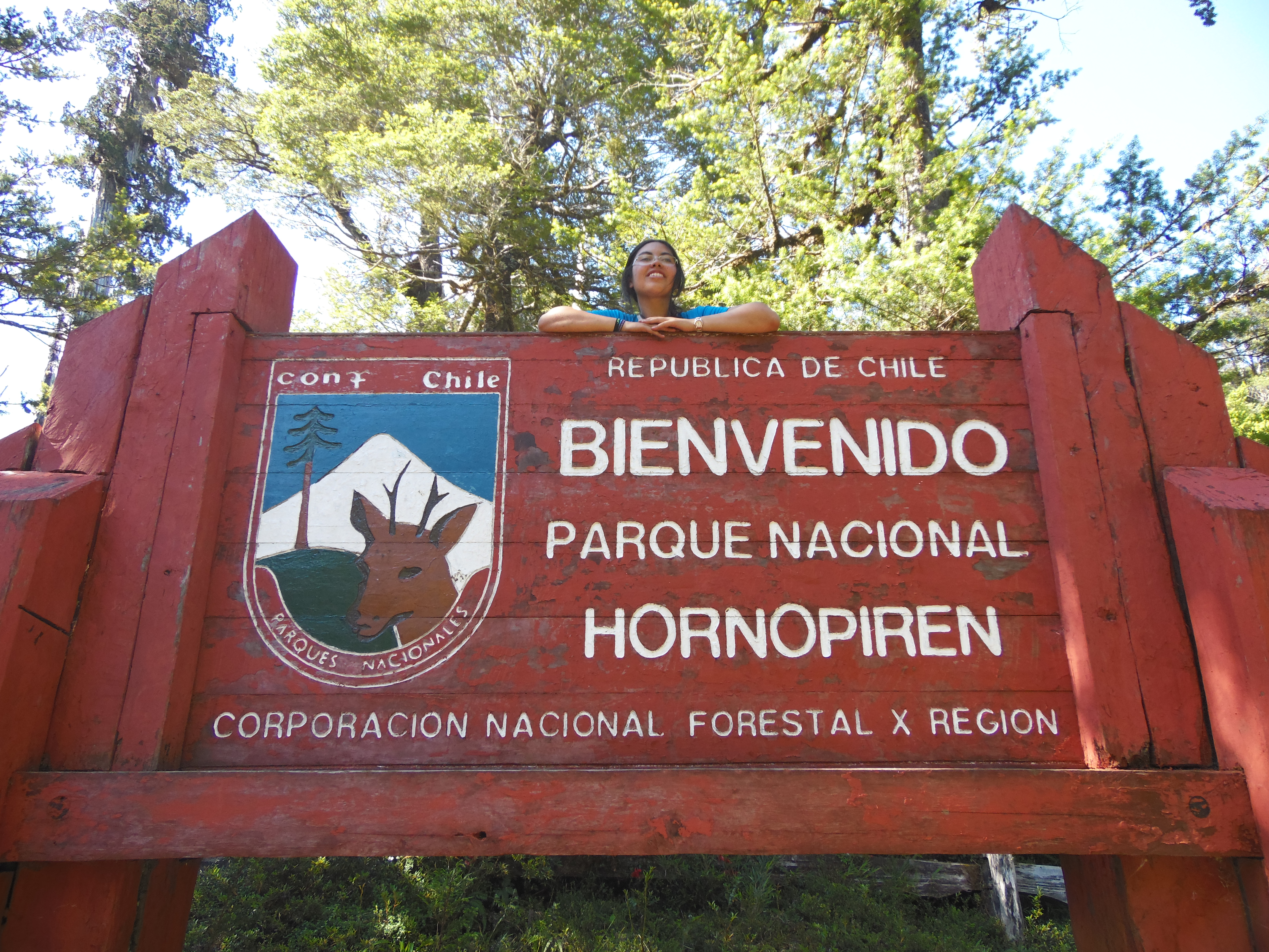 Letrero acceso del Parque Nacional Hornopirén, Región de Los Lagos, Chile.